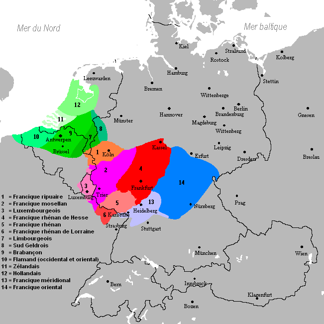 Carte des langues franciques. Correction de la carte originale disponible sur Wikimedia "Carte des langues francisques"